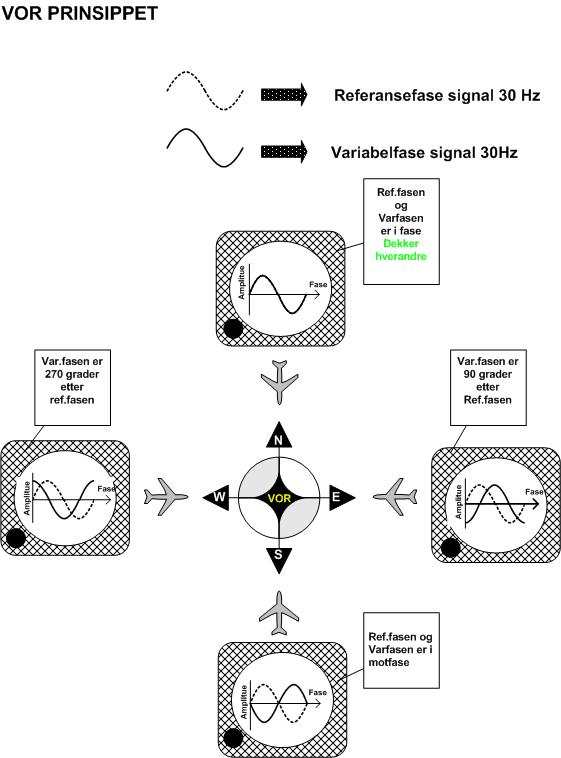 Beskriver hvordar ref. og var fasen forholder seg i en rotasjon. Dvs hvordan kurs oppstår